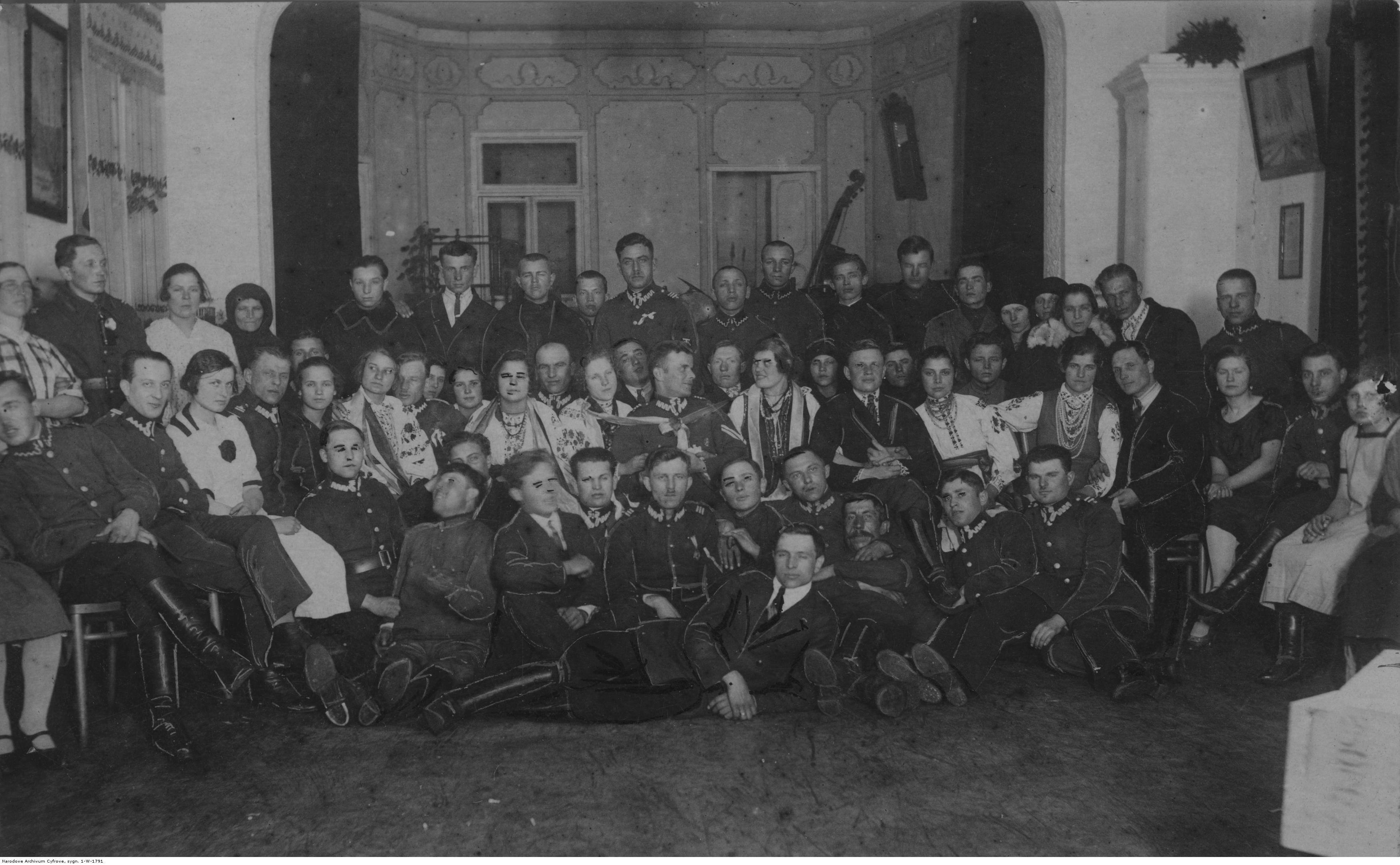 Fotografia grupowa amatorskiego teatru żołnierskiego w 4 Batalionie Korpusu Ochrony Pogranicza "Dederkały". Koncern Ilustrowany Kurier Codzienny - Archiwum Ilustracji